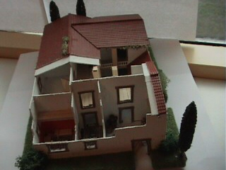 Opengewerkt model van een Grieks Laat-Klassiek huis, ca. 400 v.Chr. Gebaseerd op een deels opgegraven woning in Olynthos (Griekenland). Het huis ligt deel verzonken in de grond. Het huis heeft een verdieping. In het midden een met houten zuilen omringde binnenplaats. De voorkamer geheel links beneden is het andron (eetkamer), daarnaast een bijkamer en daarnaast (geheel rechts, beneden) de opslagruimte. De hoofdingang is op de foto niet zichtbaar, maar bevindt zich aan de rechterkant van het huis. Op de eerste verdieping bevinden zich de vrouwenvertrekken. Schaal: 1 cm = 1 m. Eigen werk. Zowel de foto als het schaalmodel zijn door mij gemaakt.